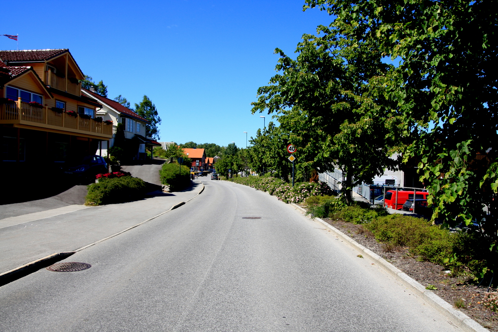 Fylkesvei 341 Kaiveien